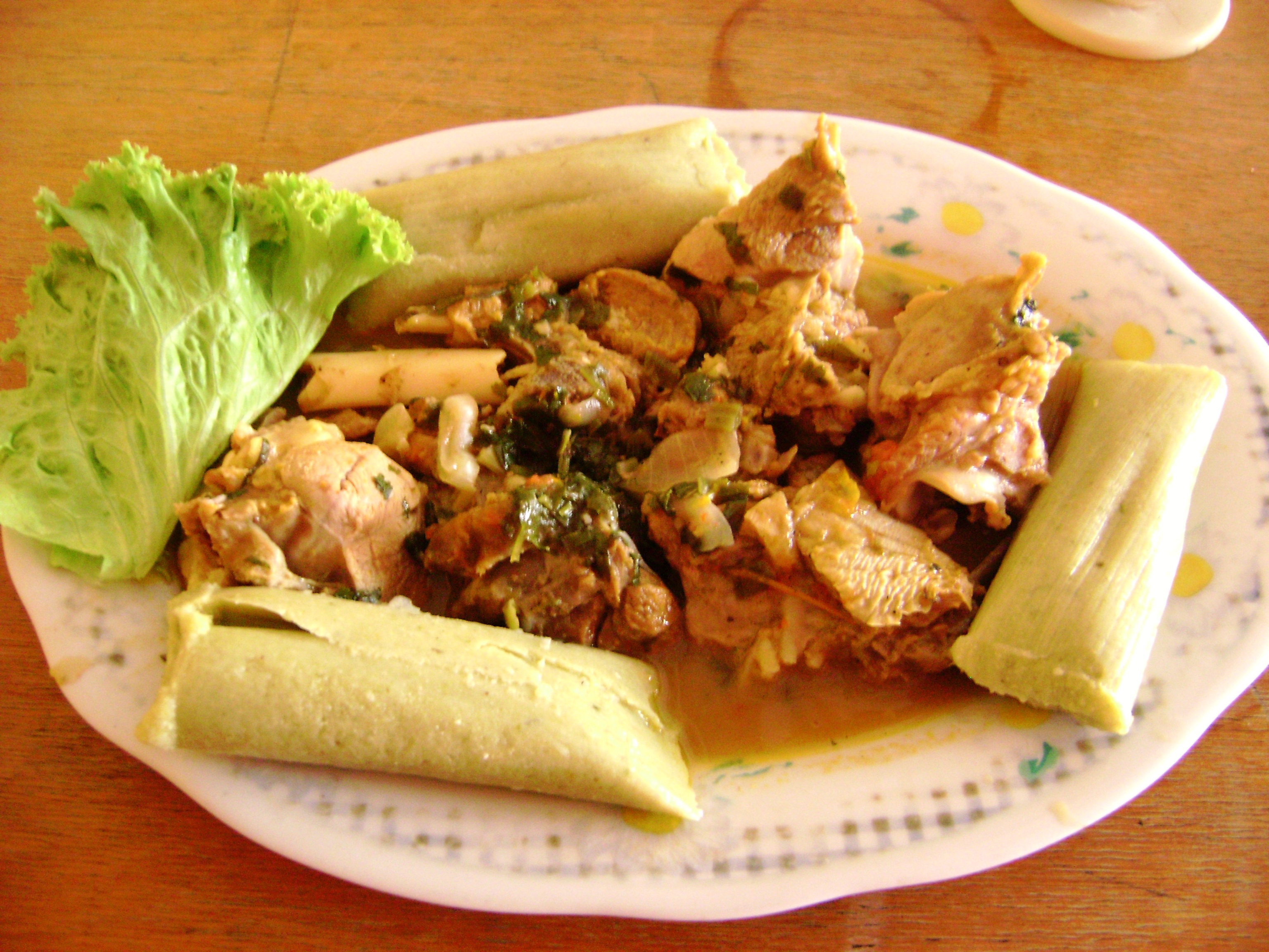 Cabrito con tamales. Piura, Perú.